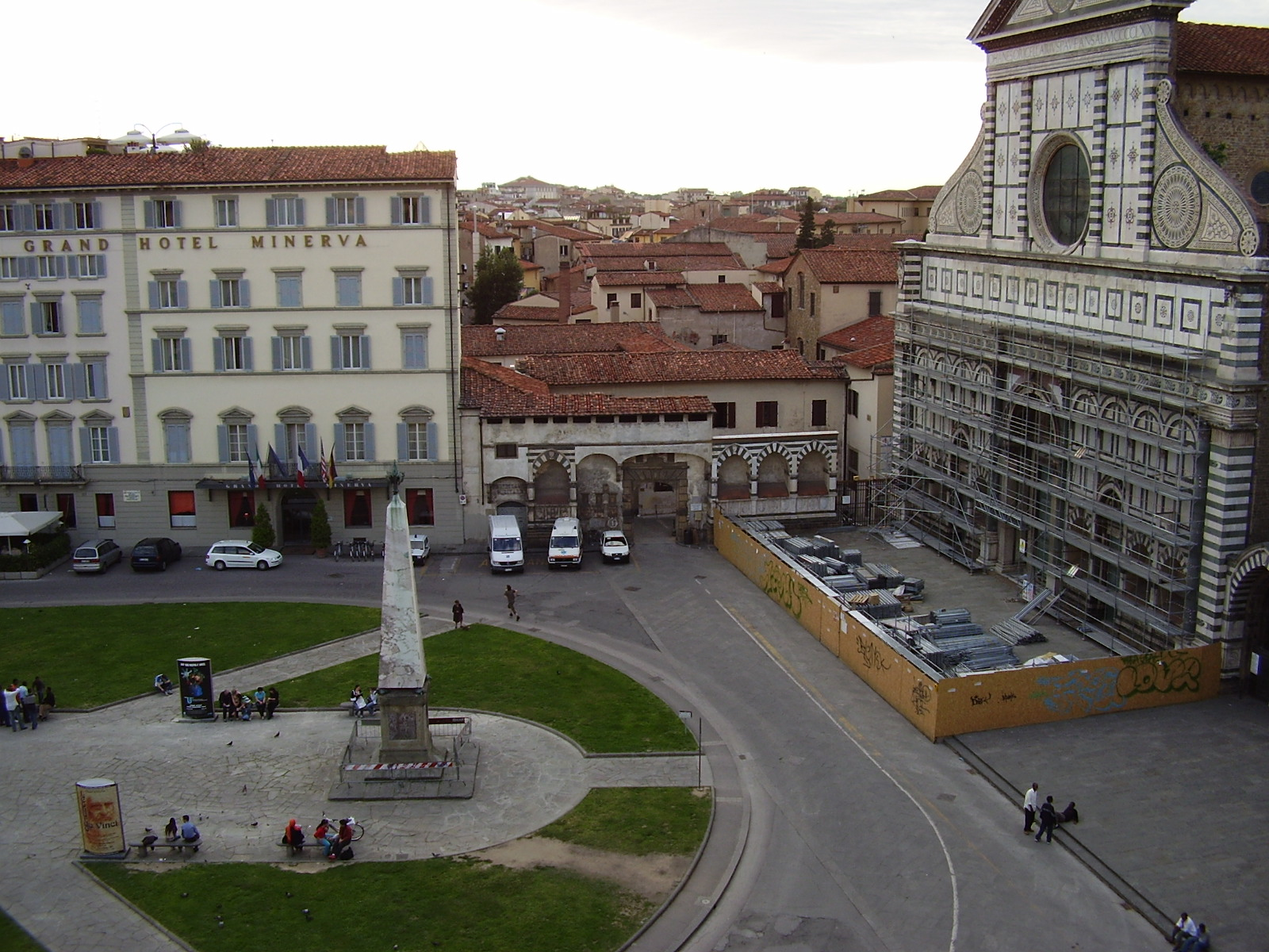 Santa Maria Novella Square, aerial view, in Florence, Italy